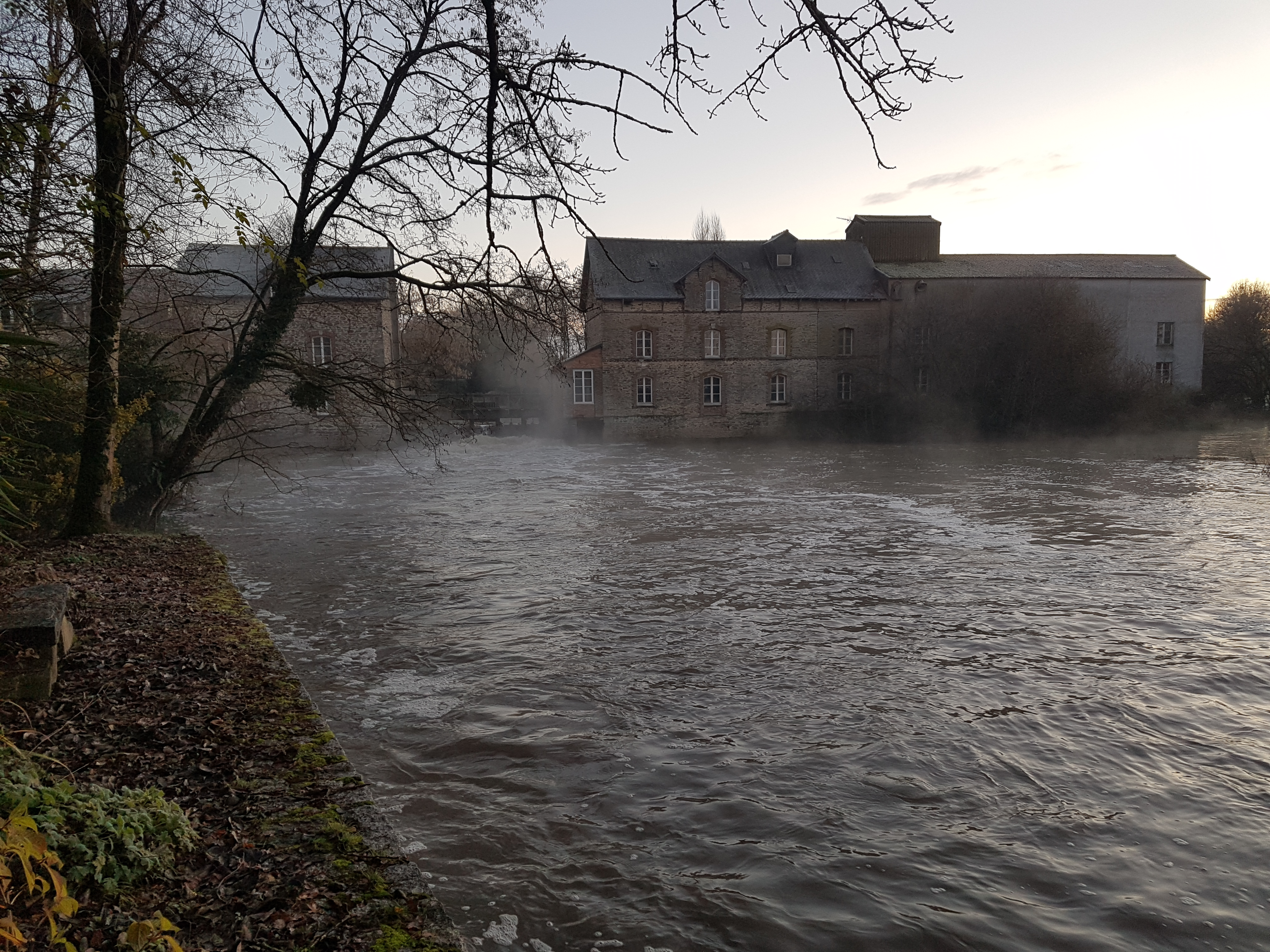 Le Moulin Desgués lors d'une crue de la Vilaine.